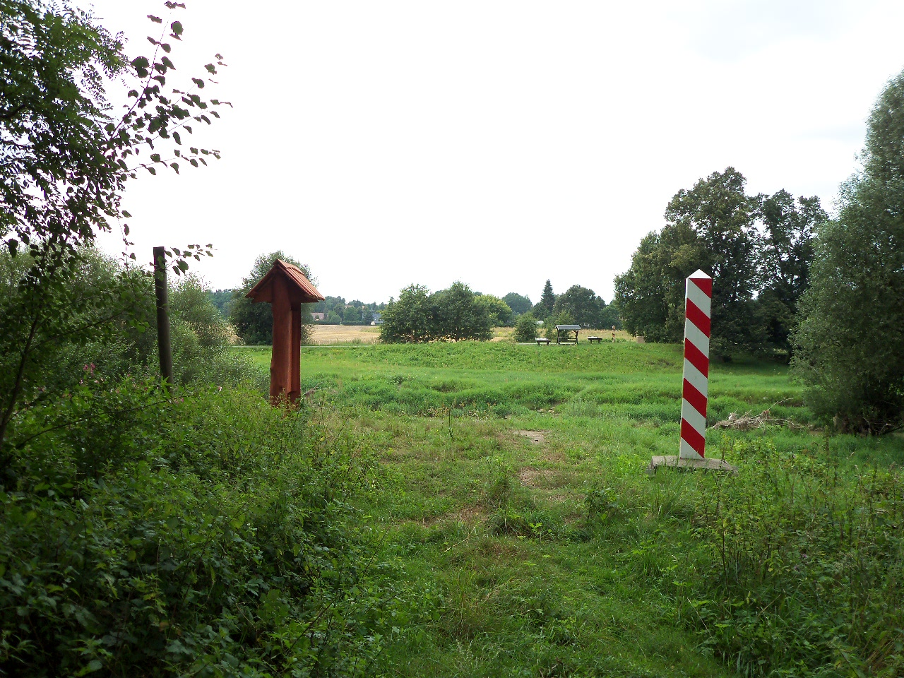 Słup graniczny Prędocice (Toporów)